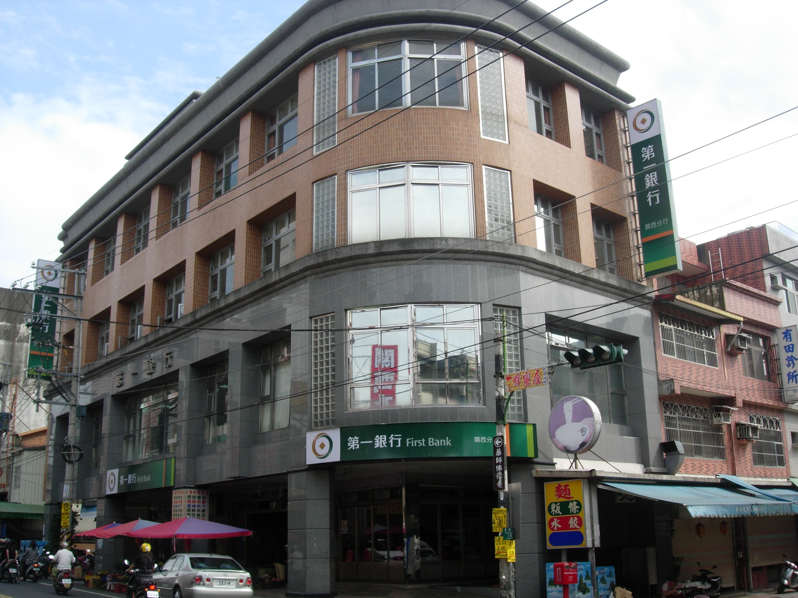 中文（台灣）: 第一商業銀行關西分行。